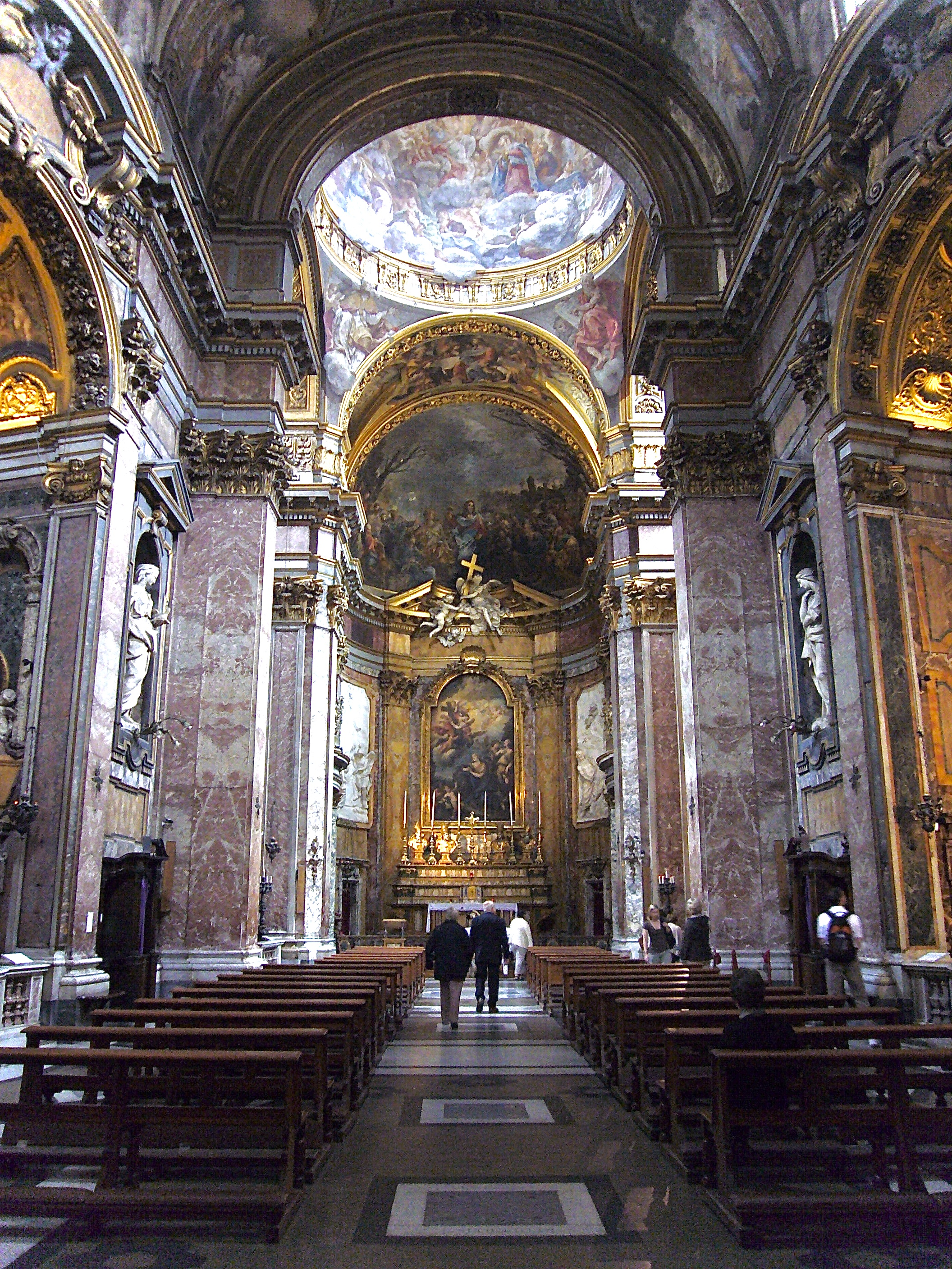 Navata della Chiesa